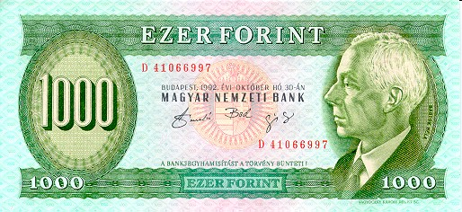 HUF 1000 - obverse 1992